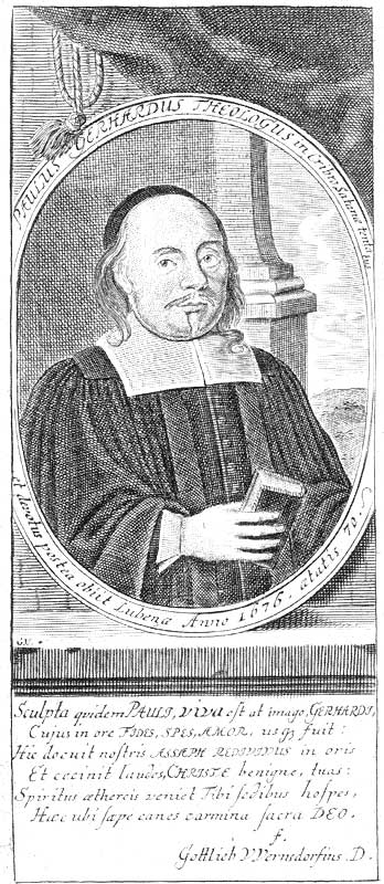 Kupferstich Paul Gerhardt (1607-1676), lutherischer Theologe und Dichter